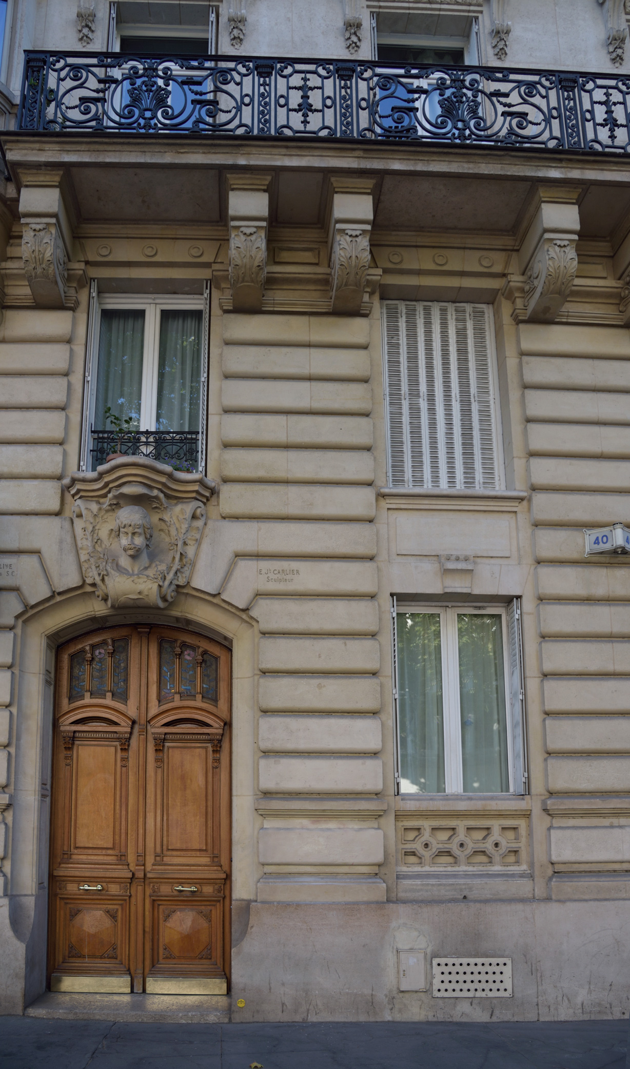 mascaron et consoles - immeuble décoré par Emile Carlier